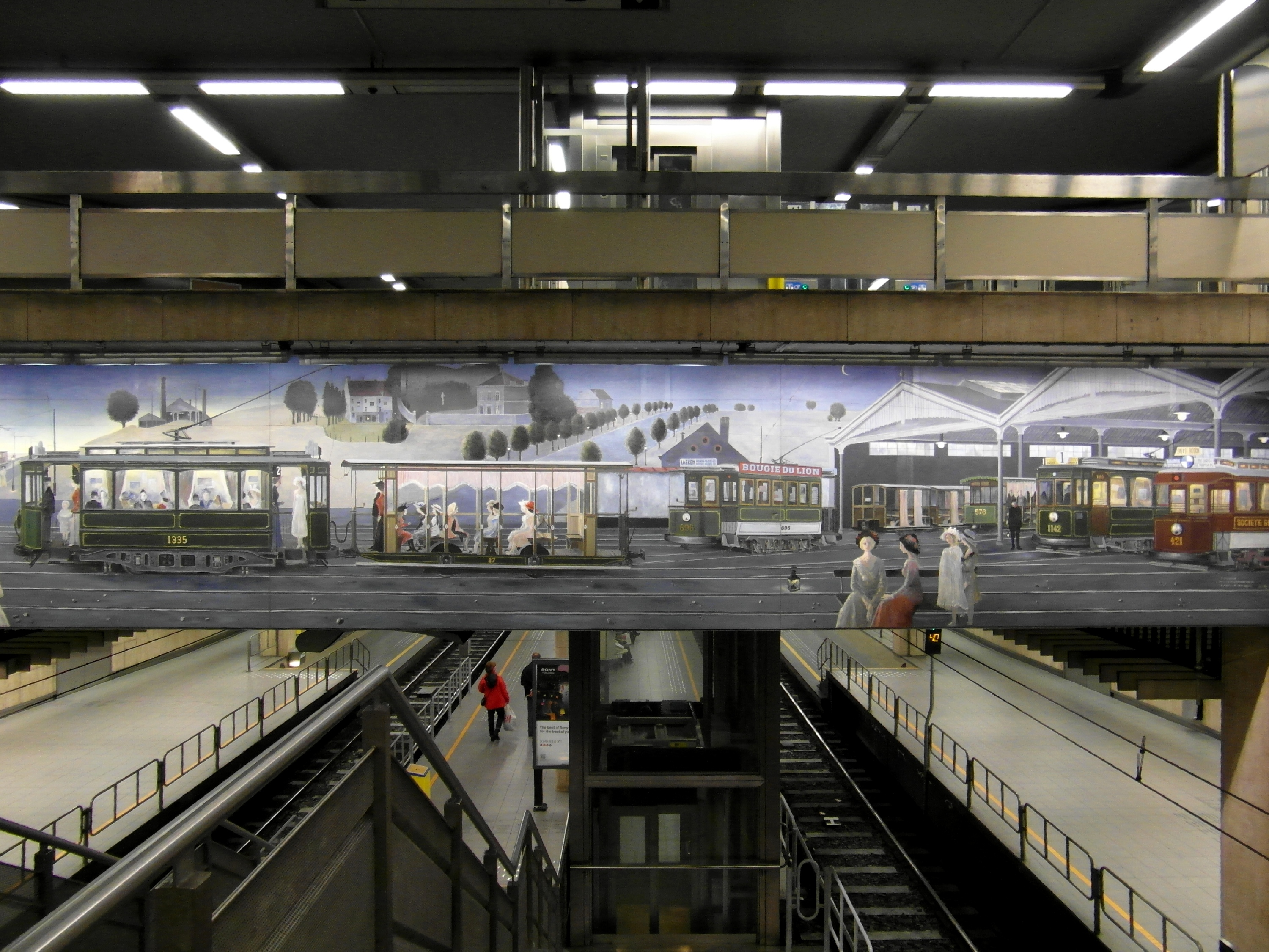 station du prémétro / premetrostation